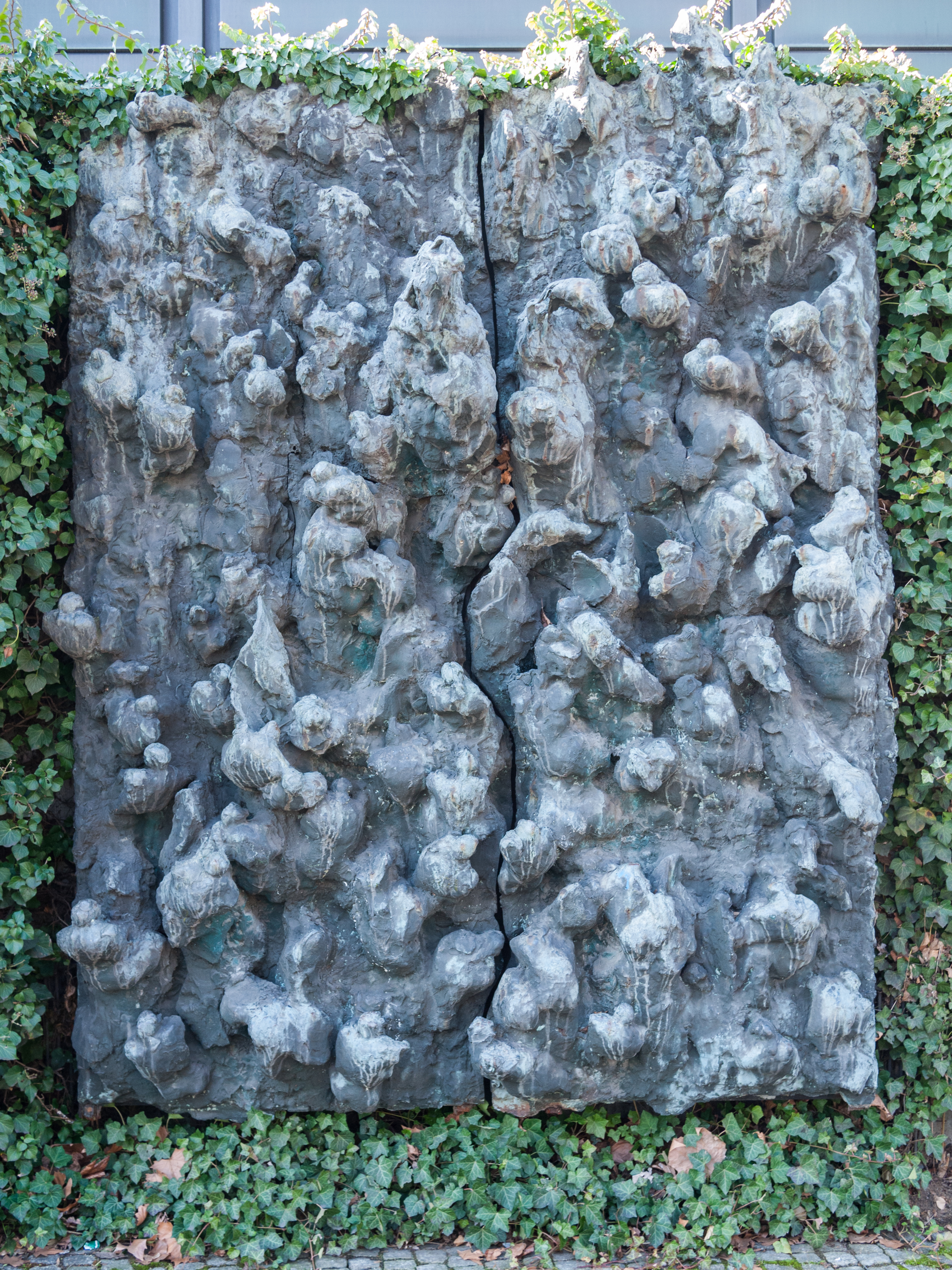 La Bataille von Jacques-Charles Delahaye, Kunstmuseum, Bergstr., Bochum Innenstadt